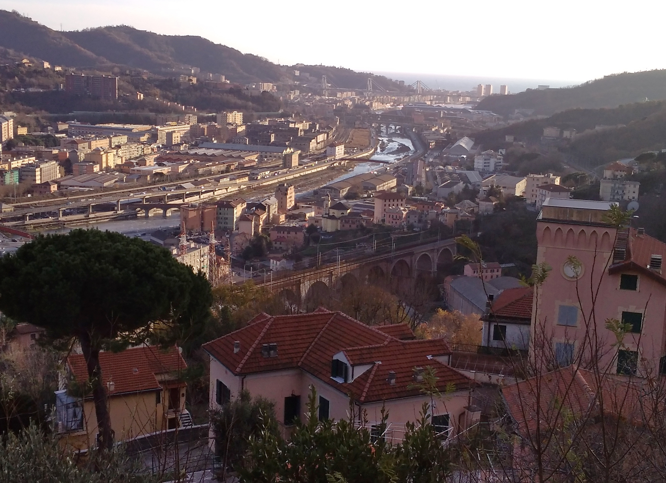 Genova, quartiere di Rivarolo, la località Trasta vista dalla collina di Murta